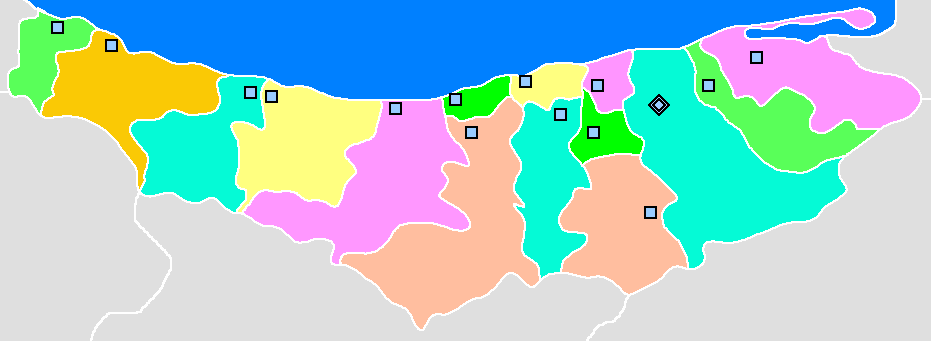 Admin map of Mazandaran